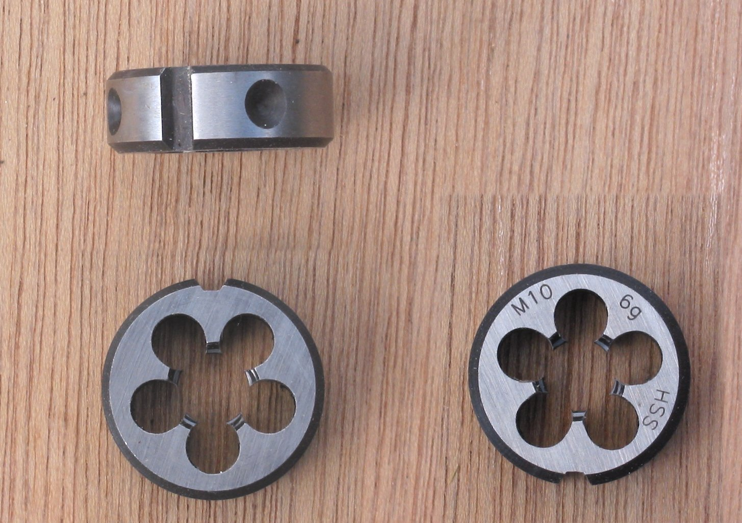 (snijblok) die 10 mm